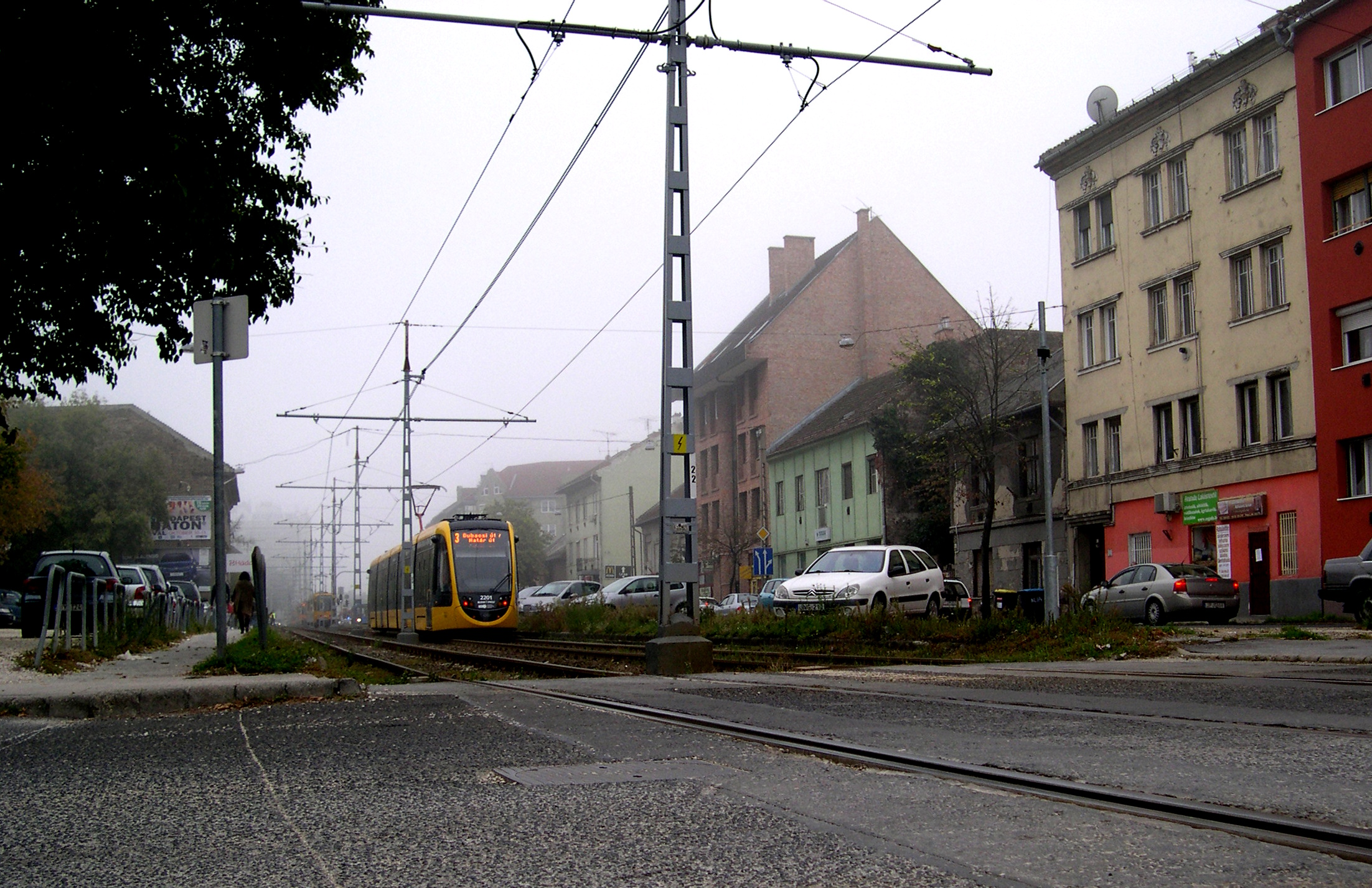 CAF Urbos 3 típusú villamos a XIV. kerületi Nagy Lajos király útja és Gyarmat utca sarkán